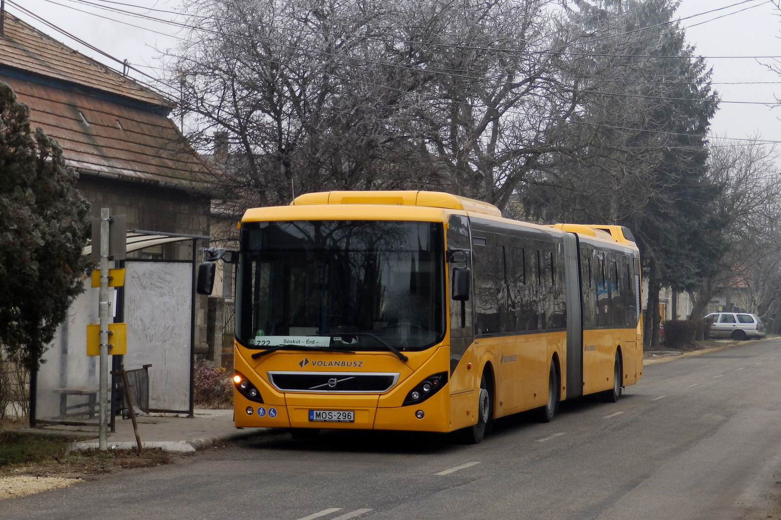 A Volánbusz Volvo 7900A típusú autóbusza 2016 decemberében, nem sokkal az átfestése után. Korábban égszínkék festéssel közlekedett a BKK agglomerációs vonalain.